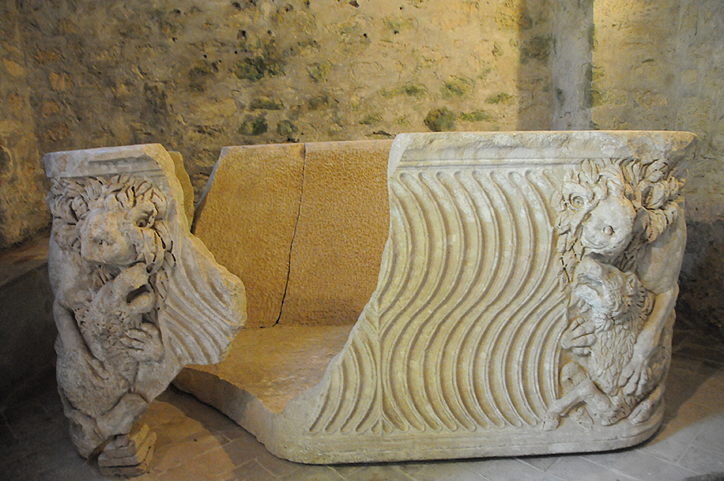 San Giovanni in Argentella - Palombara Sabina